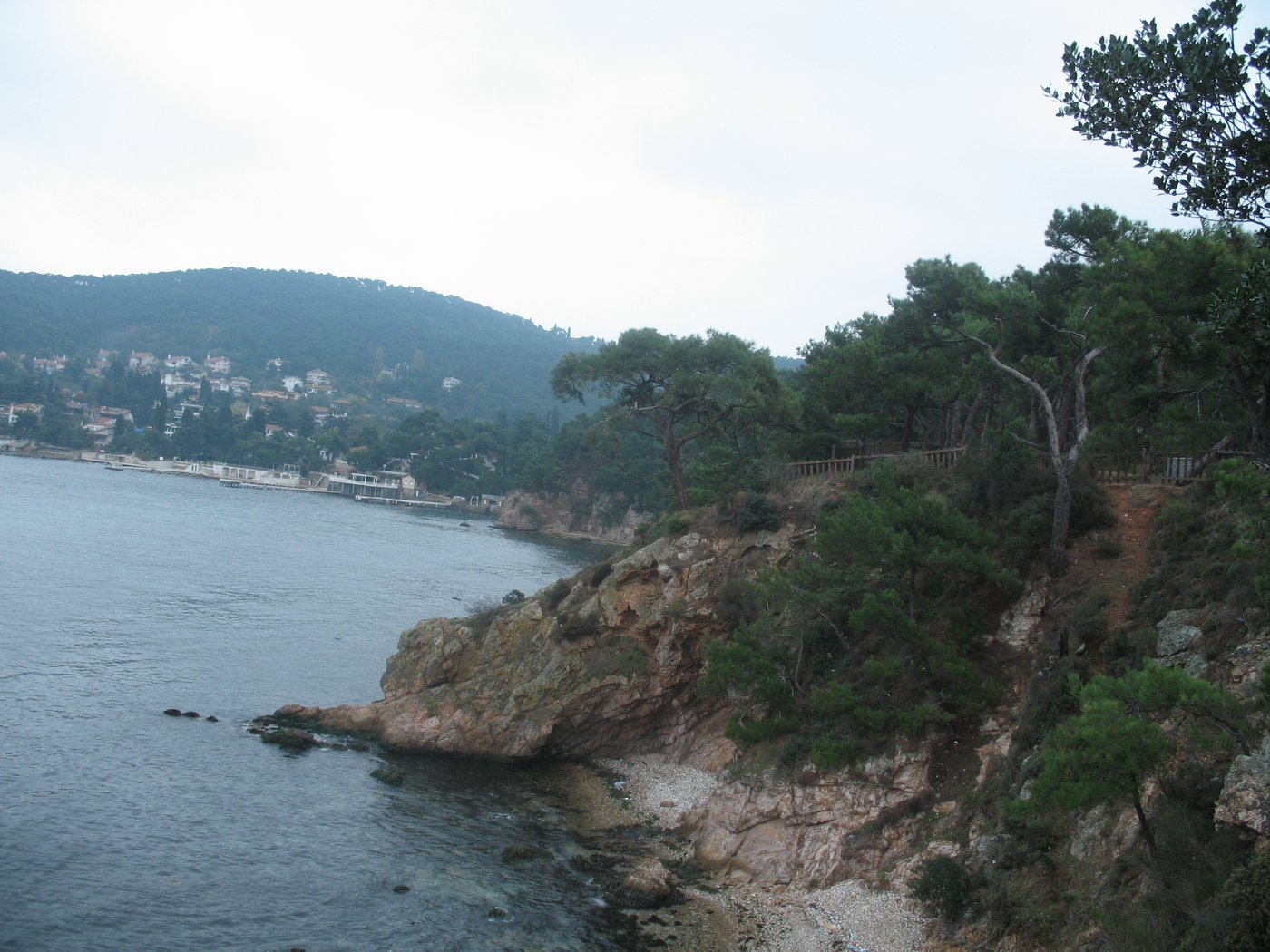 Princes' Islands,Prinkipo or Büyükada or Adalar